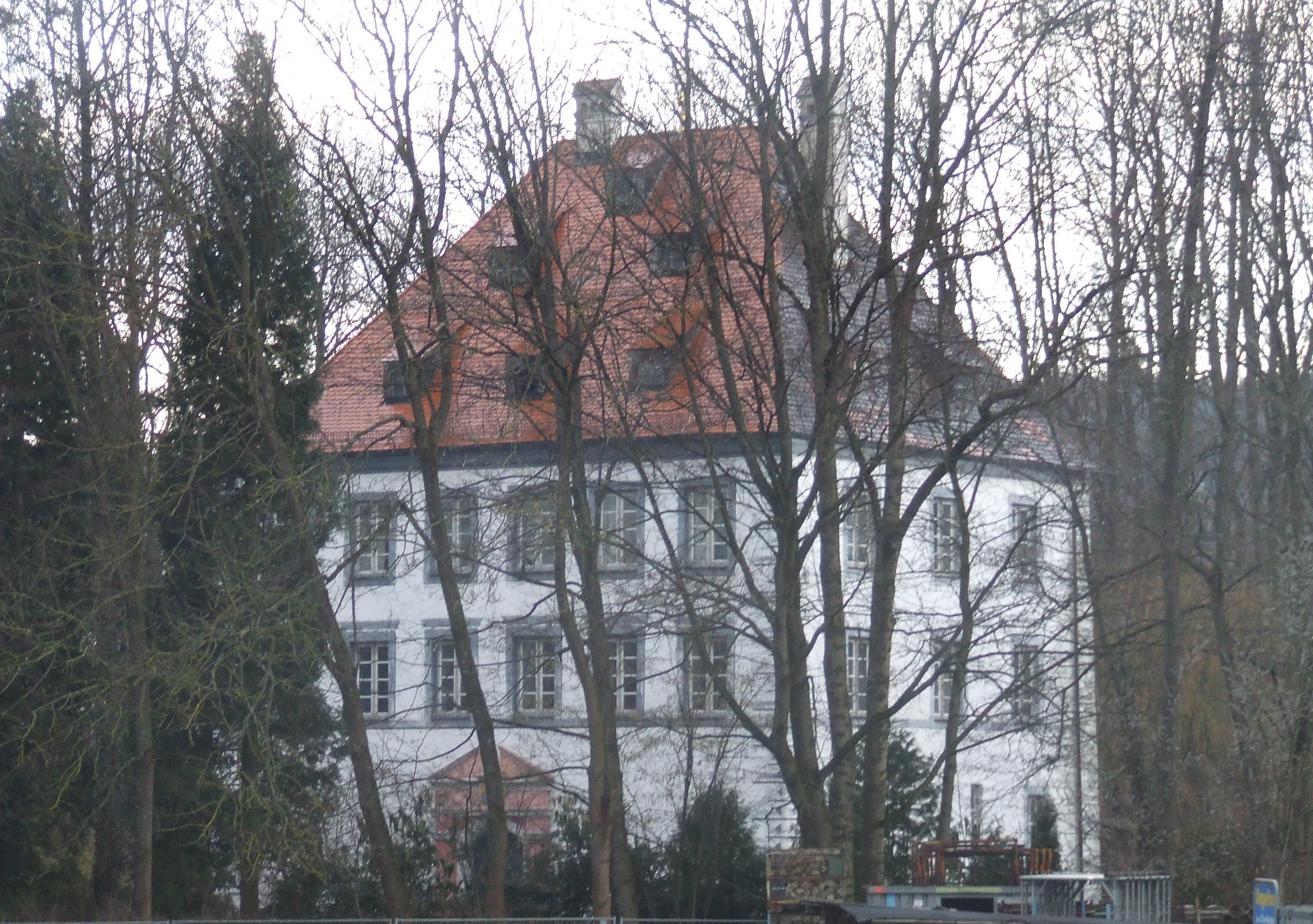 Landkreis Neumarkt in der Oberpfalz, das Wasserschloss Schloss in Pilsach von außen, Blick von Osten.